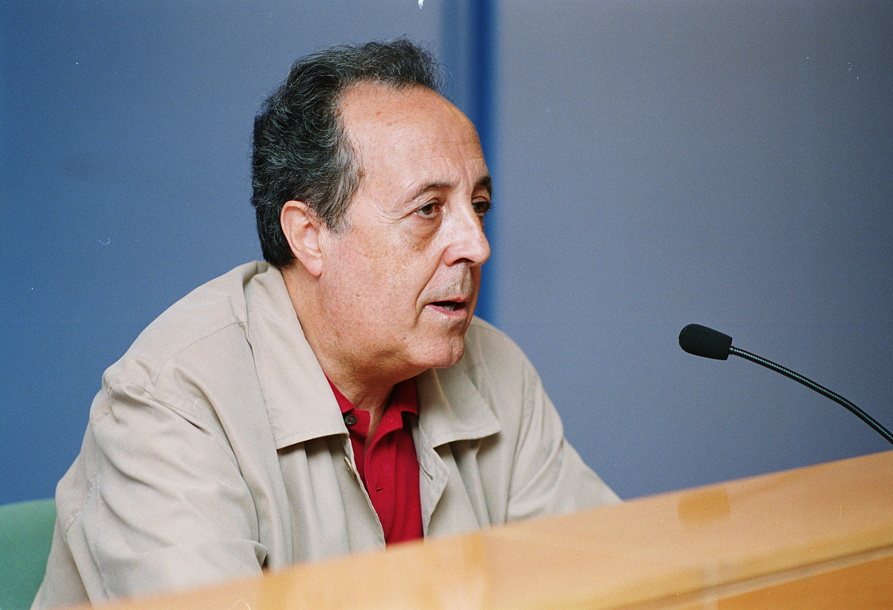 Albert Balcells al MHC el 2001.